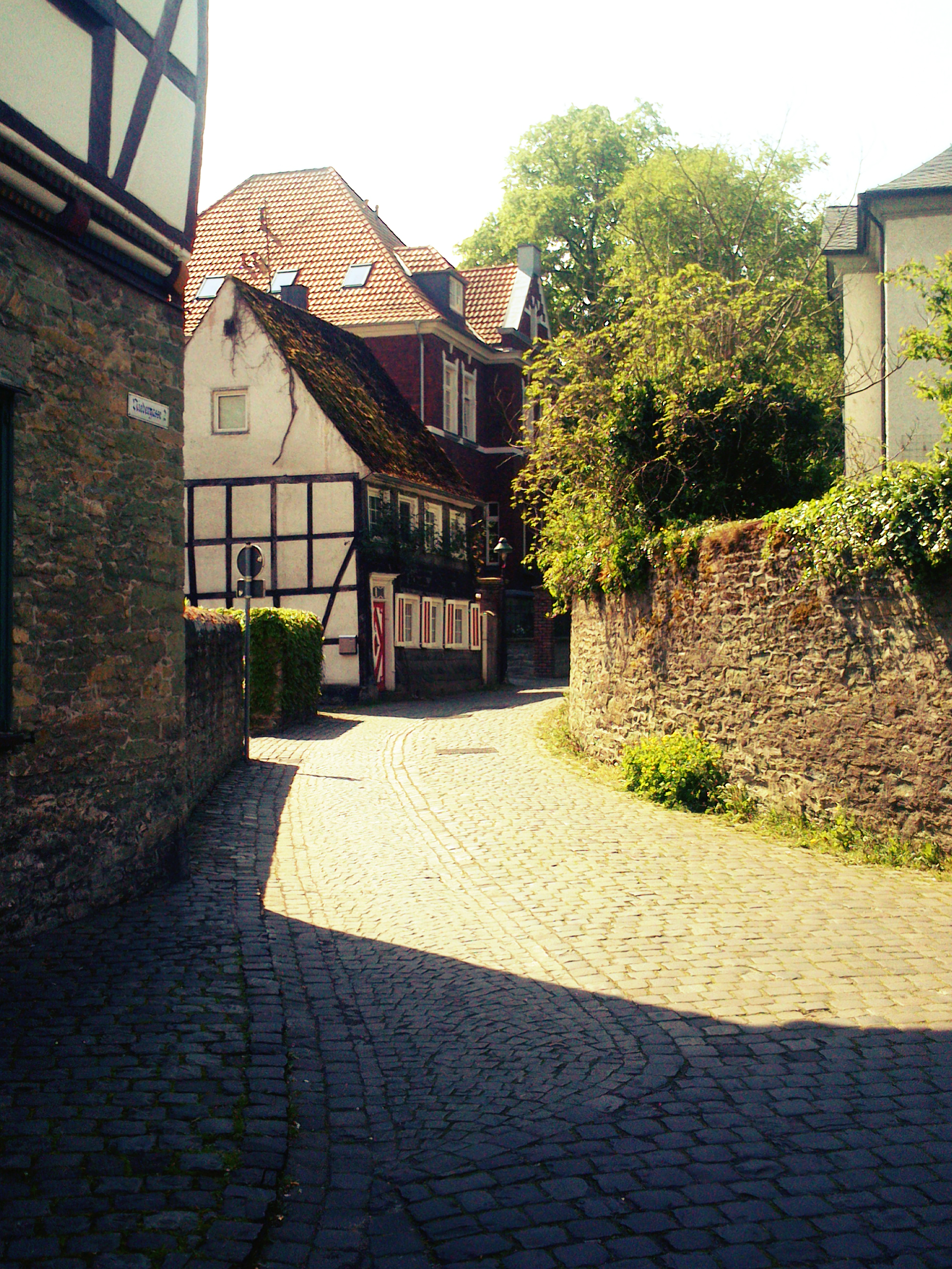 Улица Зоста.